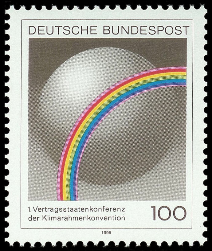 Briefmarke der Deutschen Post AG aus dem Jahre 1995, 1.Vertragsstaatenkonferenz der Klimarahmenkonvention